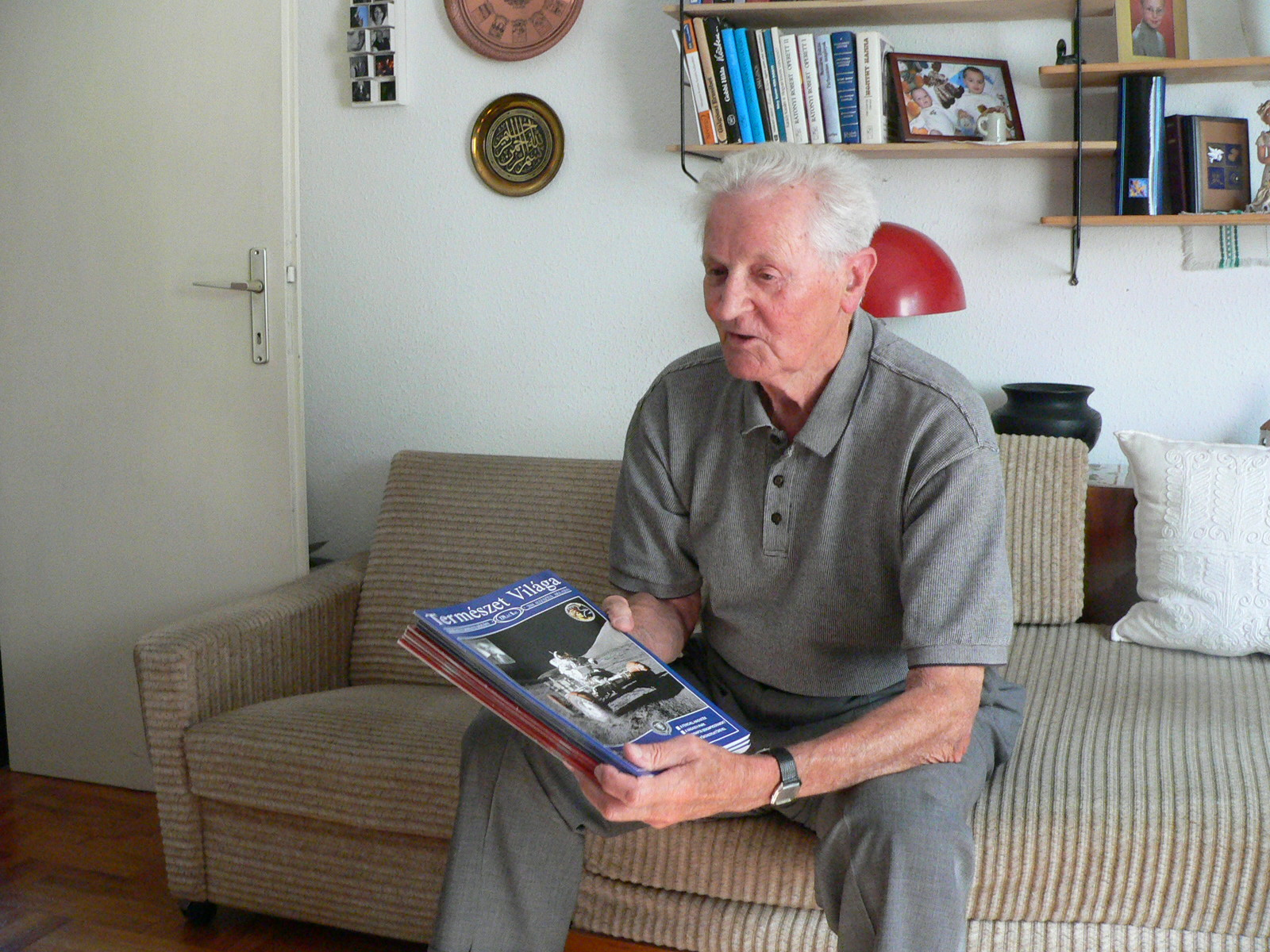 Pavlics Ferenc Budapesten, 2010-ben